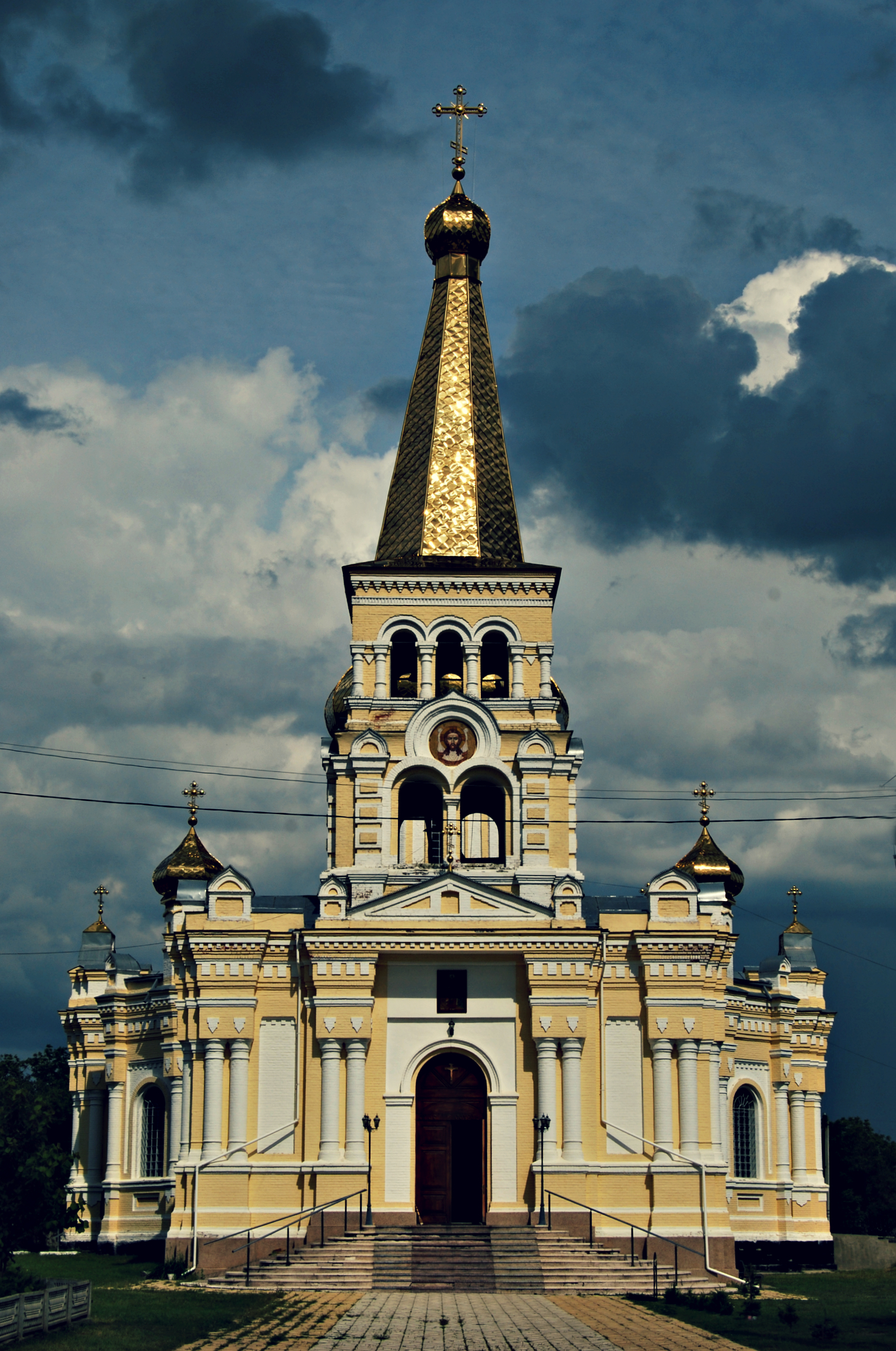 Собор Олександра Невського, Ананьїв, вул. Соборна, 54